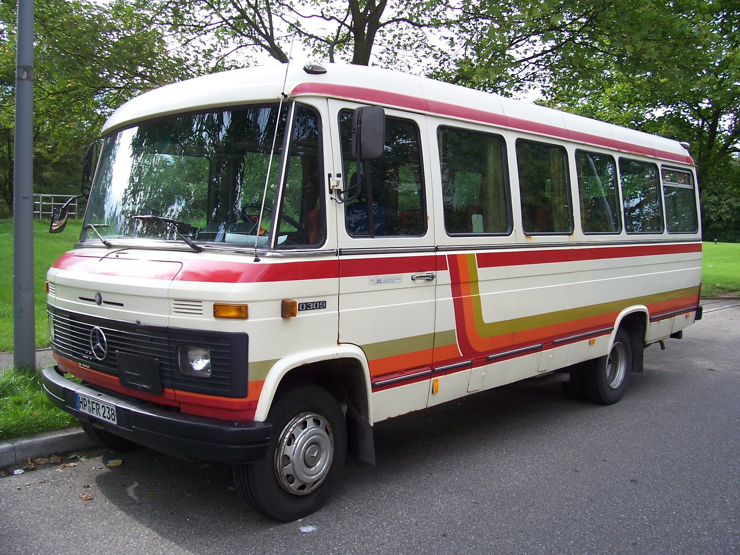 Ein Mercedes-Benz O 309 Bus im Mannheim